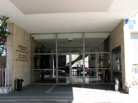 הכניסה לבית ציוני אמריקה